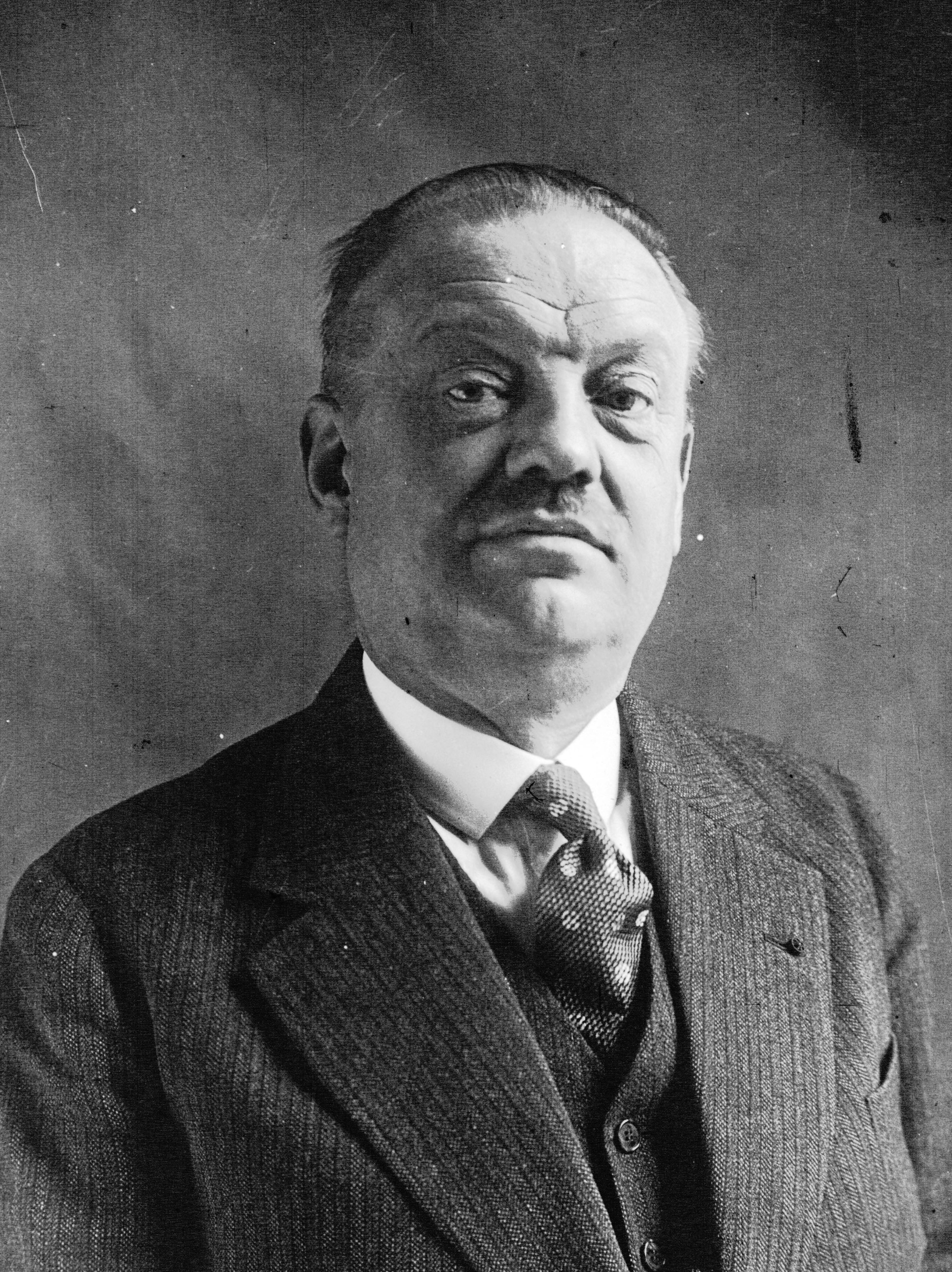 Portrait de M. Marcombes Philippe, député du Puy de Dôme [photographie de presse]